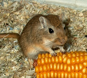 Mongolian Gerbil, Meriones unguiculatus